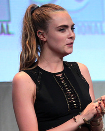 Cara Delevingne al Comic Con di San Diego nel 2015, per la presentazione del film "Suicide Squad"